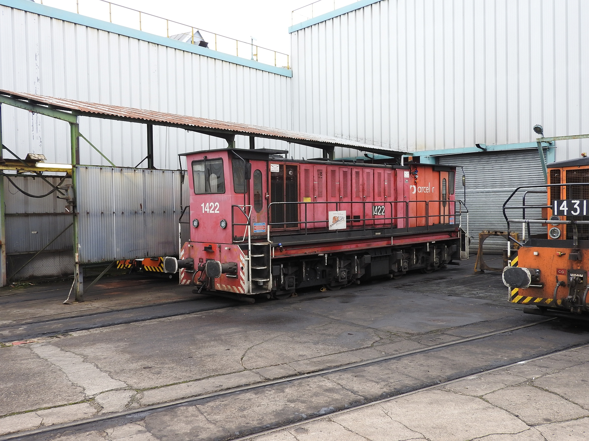 Arcelor 1422 (Fauvet Girel ?/1966), Florange, Depot Arcelor AMR, 1.04.2016